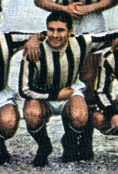 Il calciatore italiano Teobaldo Depetrini alla Juventus nella stagione 1940-41.